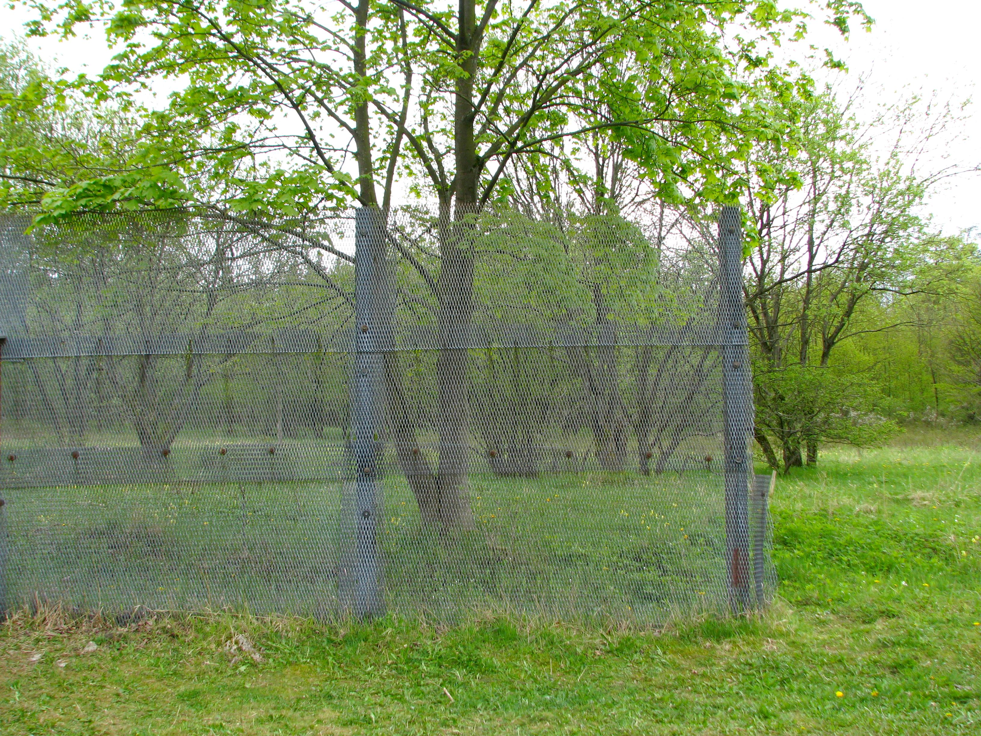 Rest des ehemaligen Streckmetallzauns an der innerdeutschen Grenze auf der Gobert.